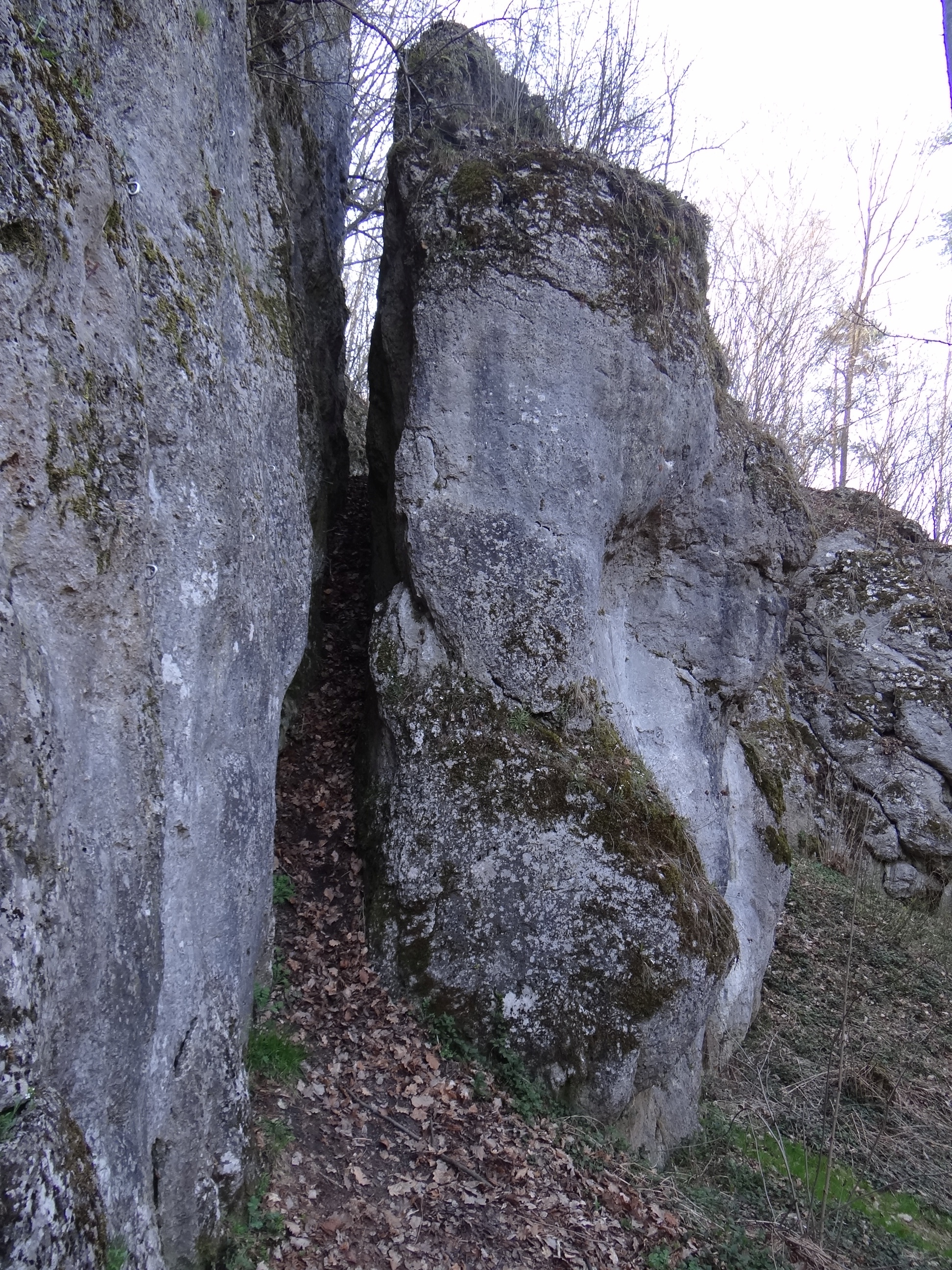 Żmijowe Skały w Dolinie Brzoskwinki